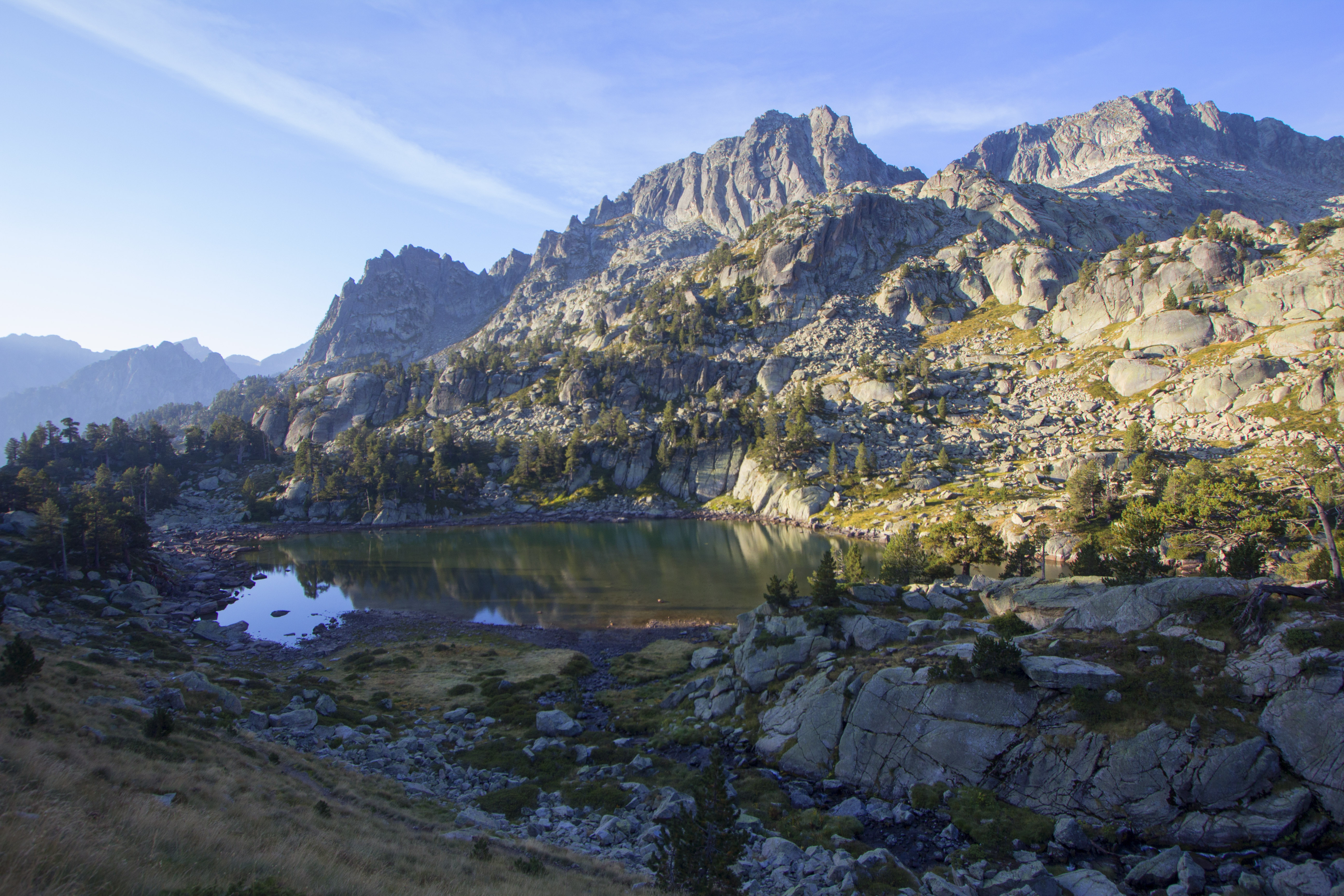 Estany de les Obagues de Ratera (Pallars Sobirà)